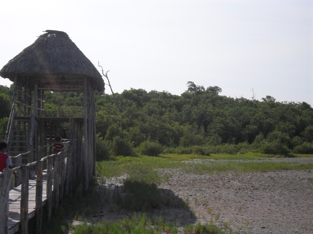 palude di mangrovie a celestun